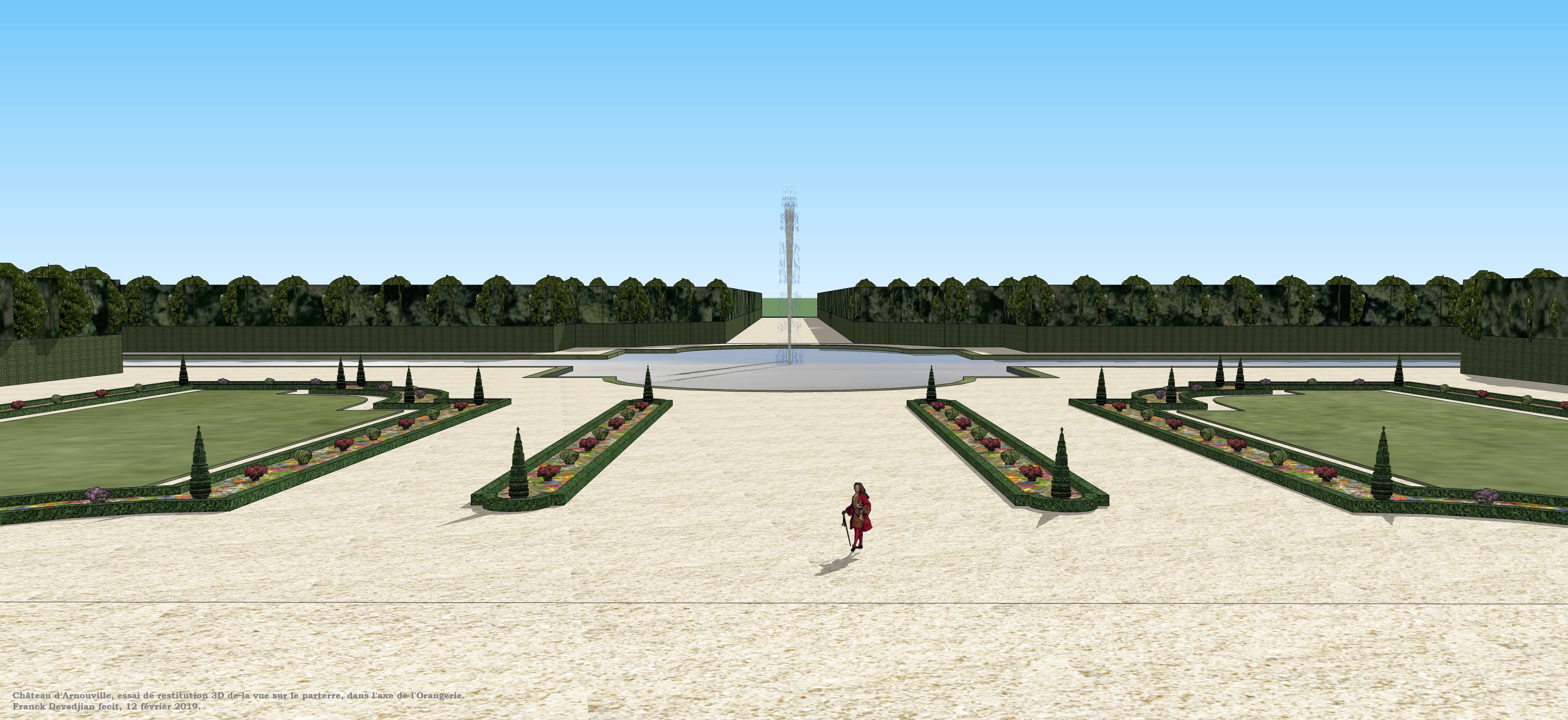 château d'Arnouville